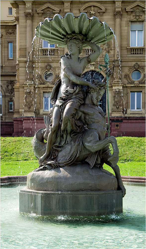 Karlsruhe, Galatea-Brunnen im Vorgarten des Erbgroßherzoglichen Palais, heute Sitz des Bundesgerichtshof.